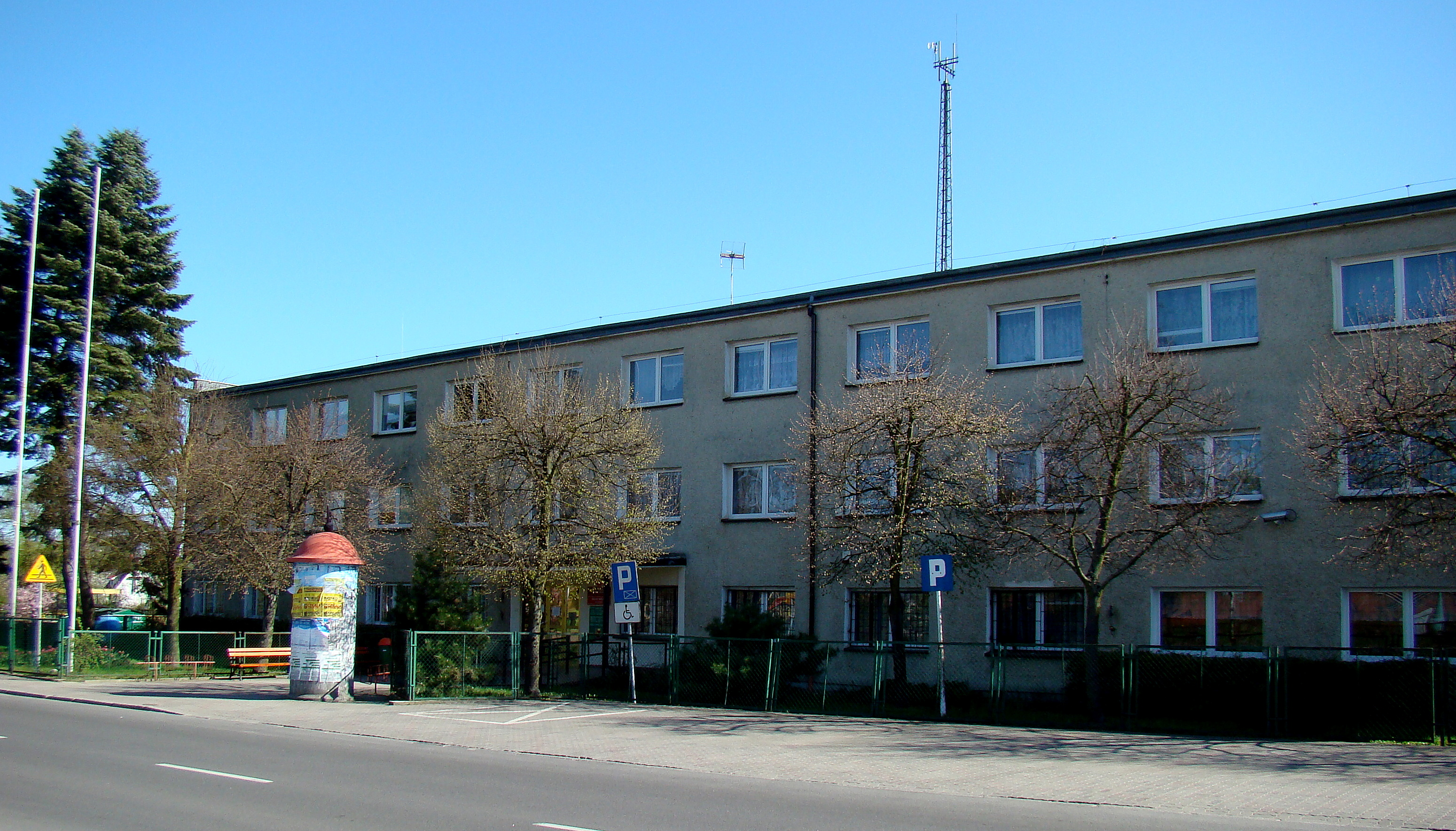 Urząd Gminy w Policach, siedziba, ul. S. Batorego (Police, Województwo zachodniopomorskie), Polska